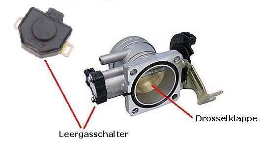 Fotomontage LGS an Drosselklappe